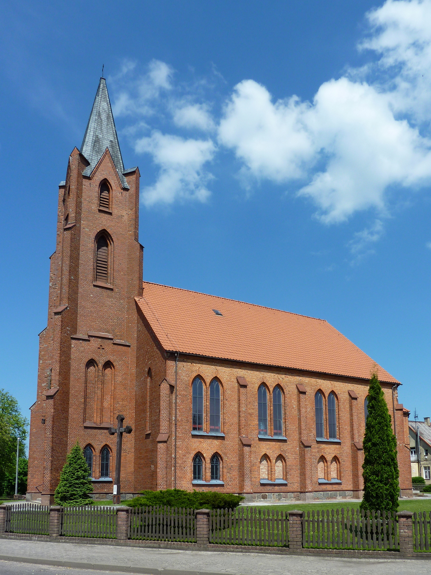 Łebunia - rzymskokatolicki kościół parafialny pw. św. Michała Archanioła, 1870.